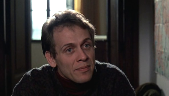 screenshot del film Il caso Moro diretto da Giuseppe Ferrara